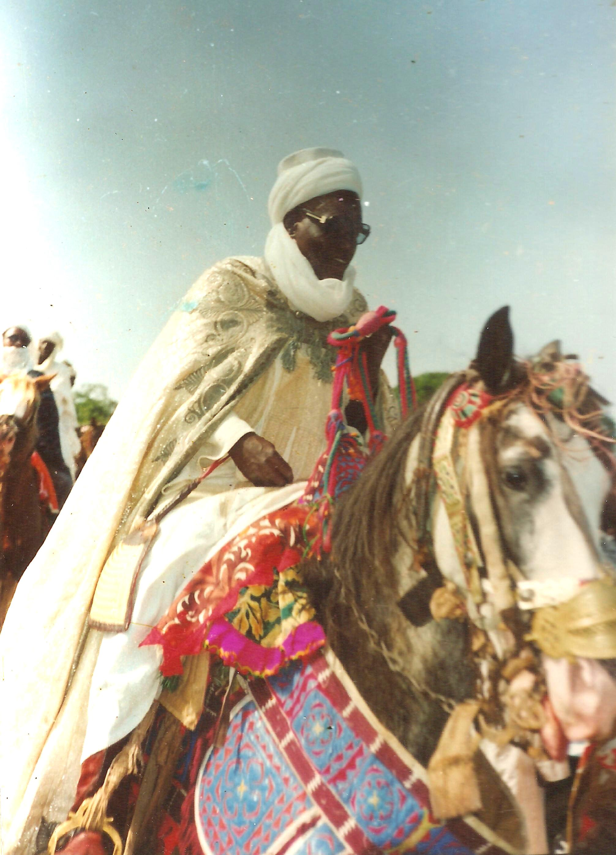 Mama Chabi et les cavaliers de la famille, en pleine démonstration à Parakou.